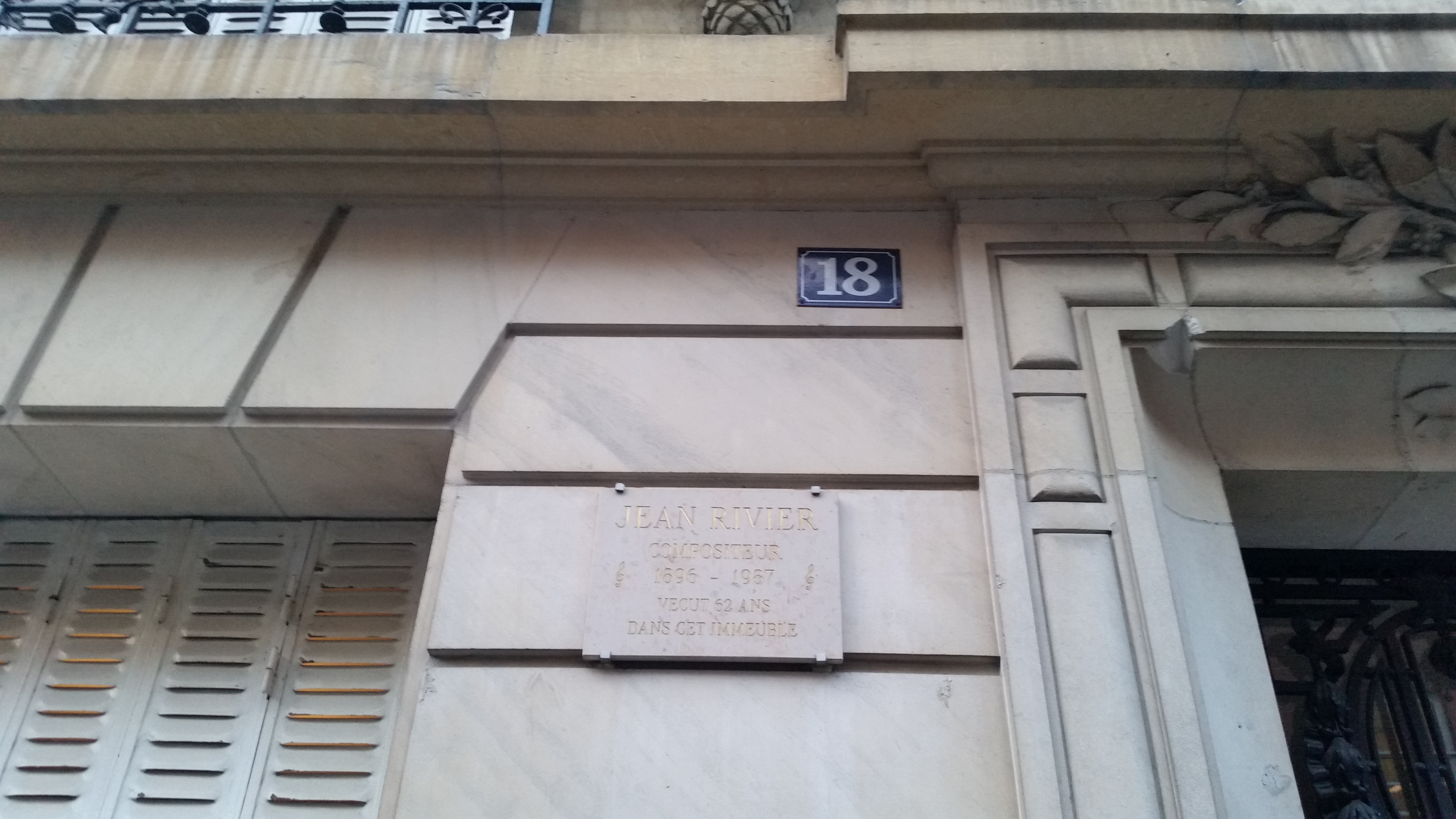 Plaque Jean Rivier 18 rue Pierre et Marie Curise 75005 Paris France